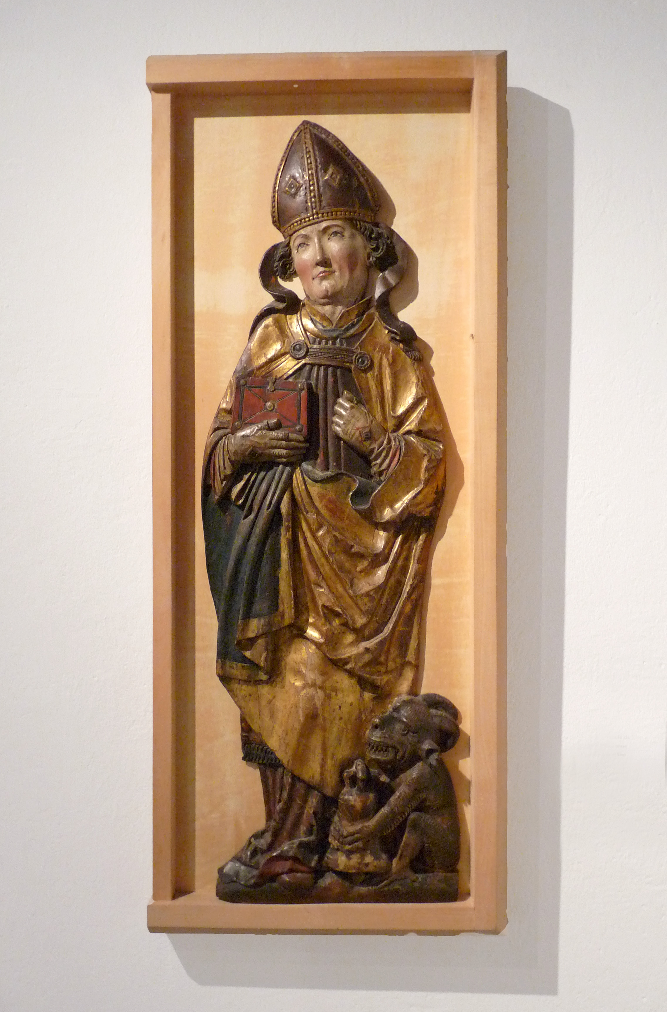 Maître souabe, Saint Théodule de Sion, vers 1500. Fragment d'un volet de retable. Tilleul, polychromie tardive. Musée de l'Œuvre Notre-Dame de Strasbourg